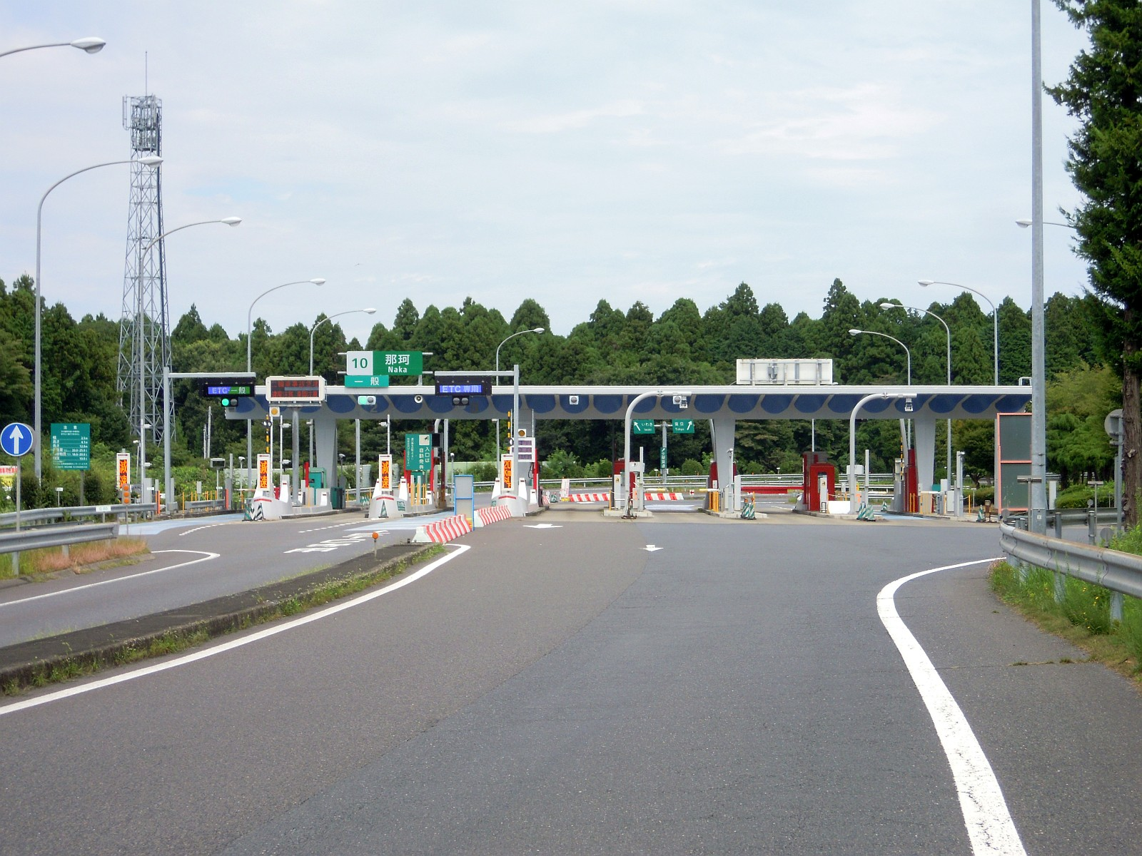 茨城県那珂市にある常磐自動車道の那珂インターチェンジ料金所を一般道側から。